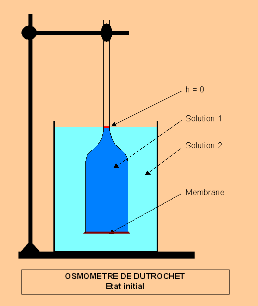 Osmomètre de Dutrochet, état initial, pression osmotique, membrane, osmose, dialyse, appareil de mesure.